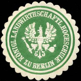 Sealing stamp Title: Königliche Landwirthschaftliche Hochschule zu Berlin Description: grün, weiß, geprägt Place: Berlin size: 4 cm